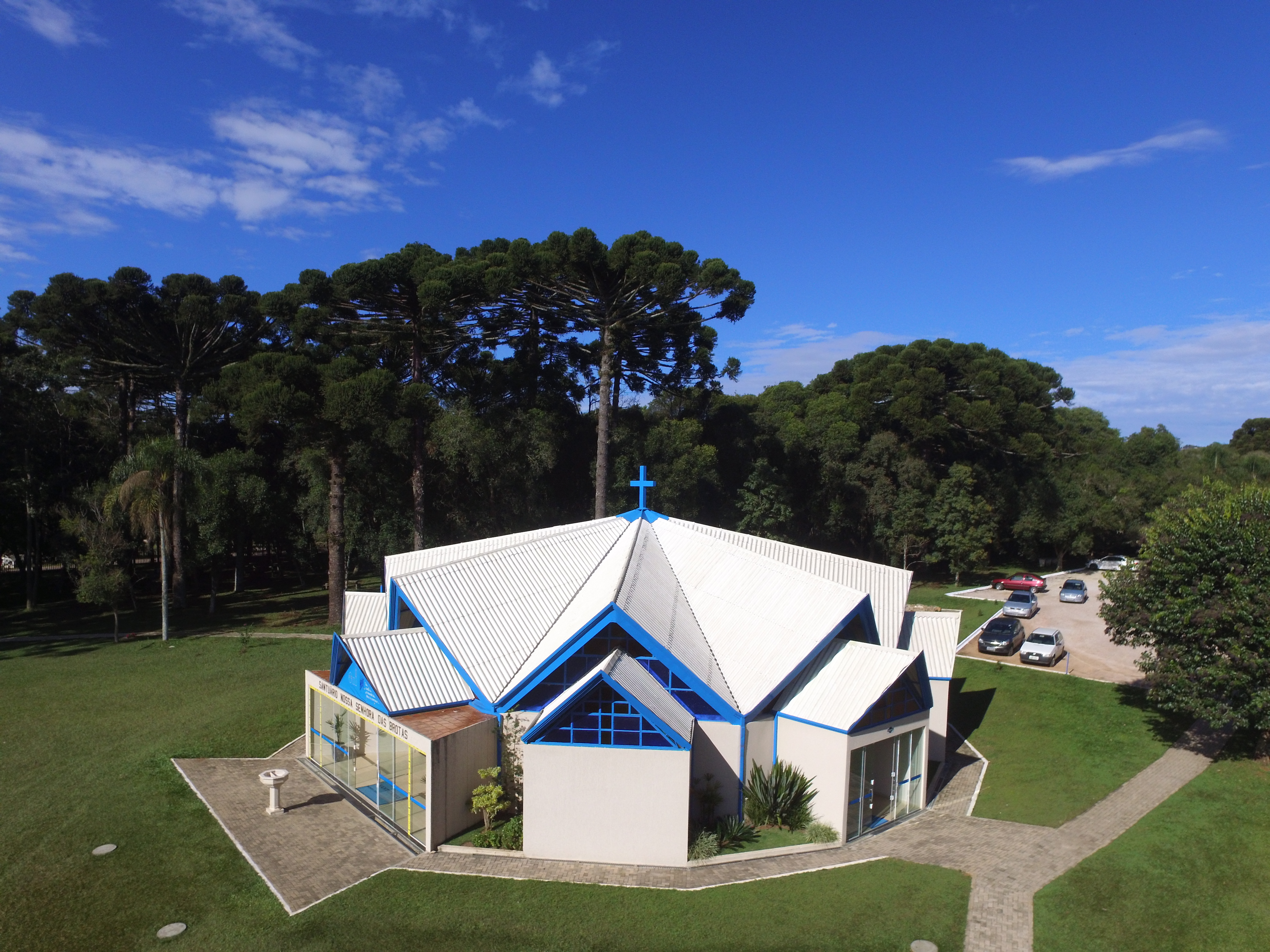 Santuário.